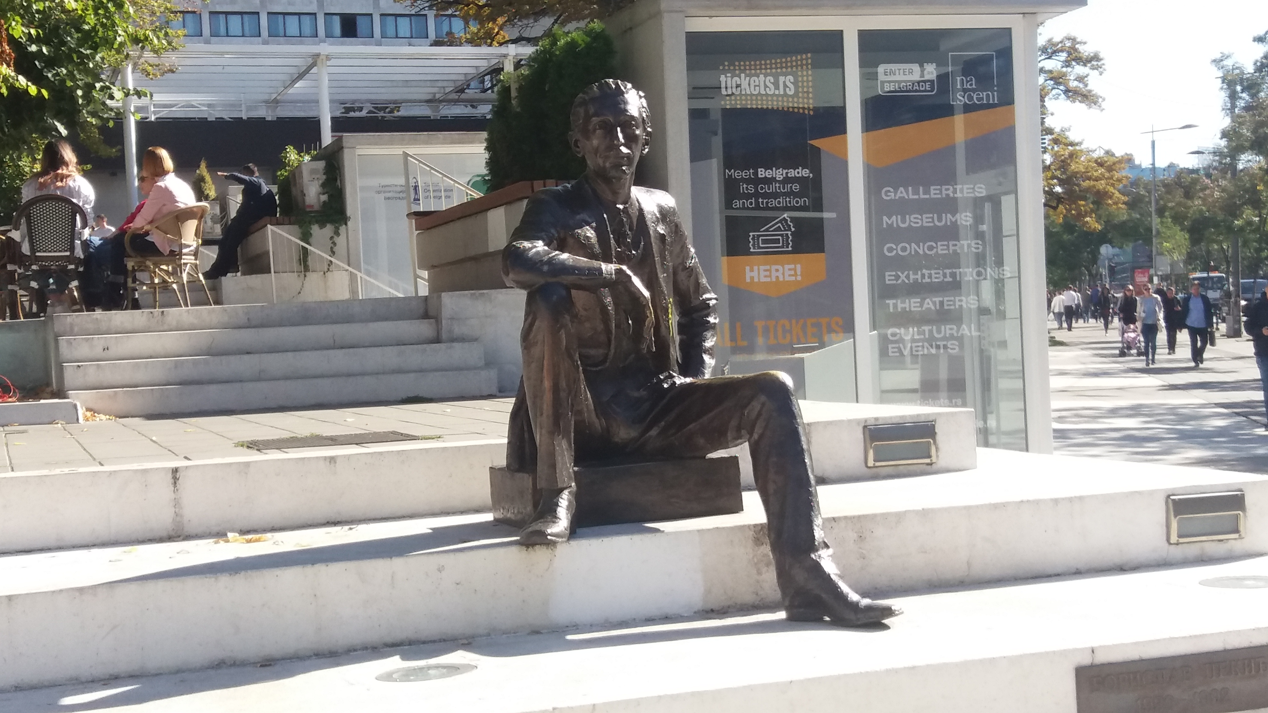 Spomenik Borislavu Pekiću u Beogradu